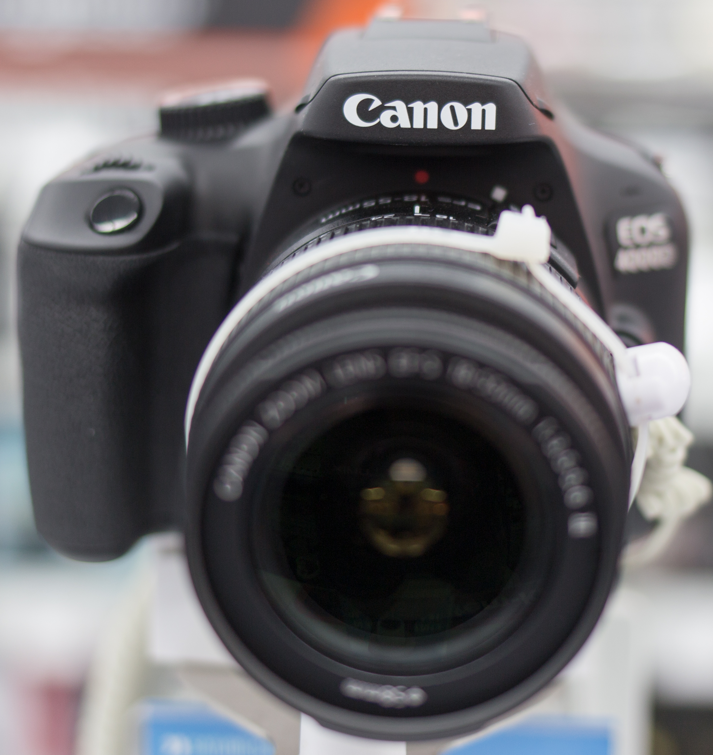 Canon EOS 4000D